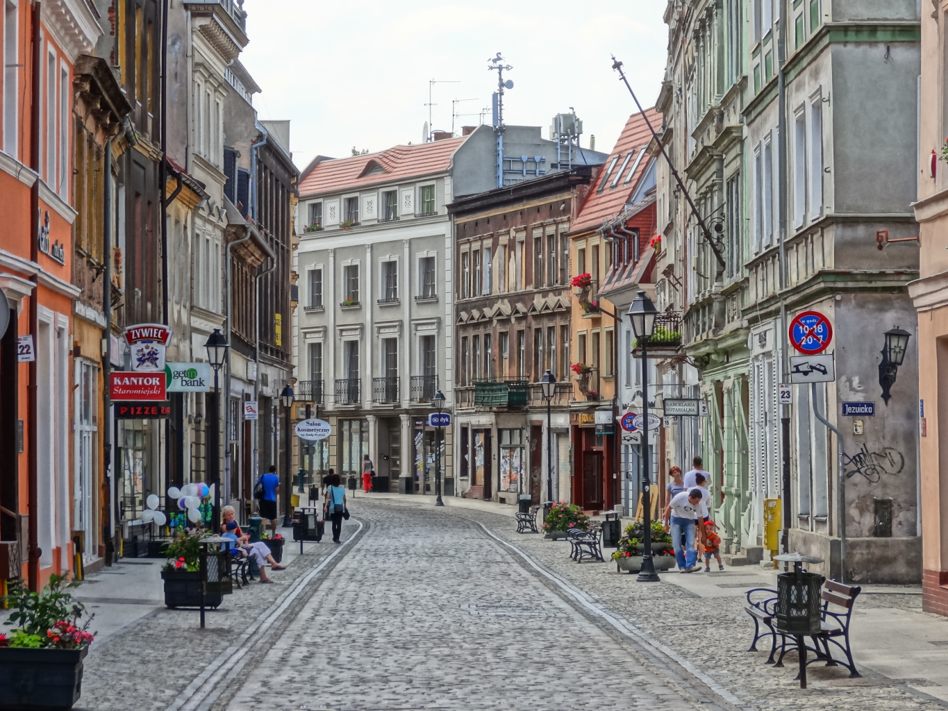 Ulica Długa na Starym Mieście w Bydgoszczy